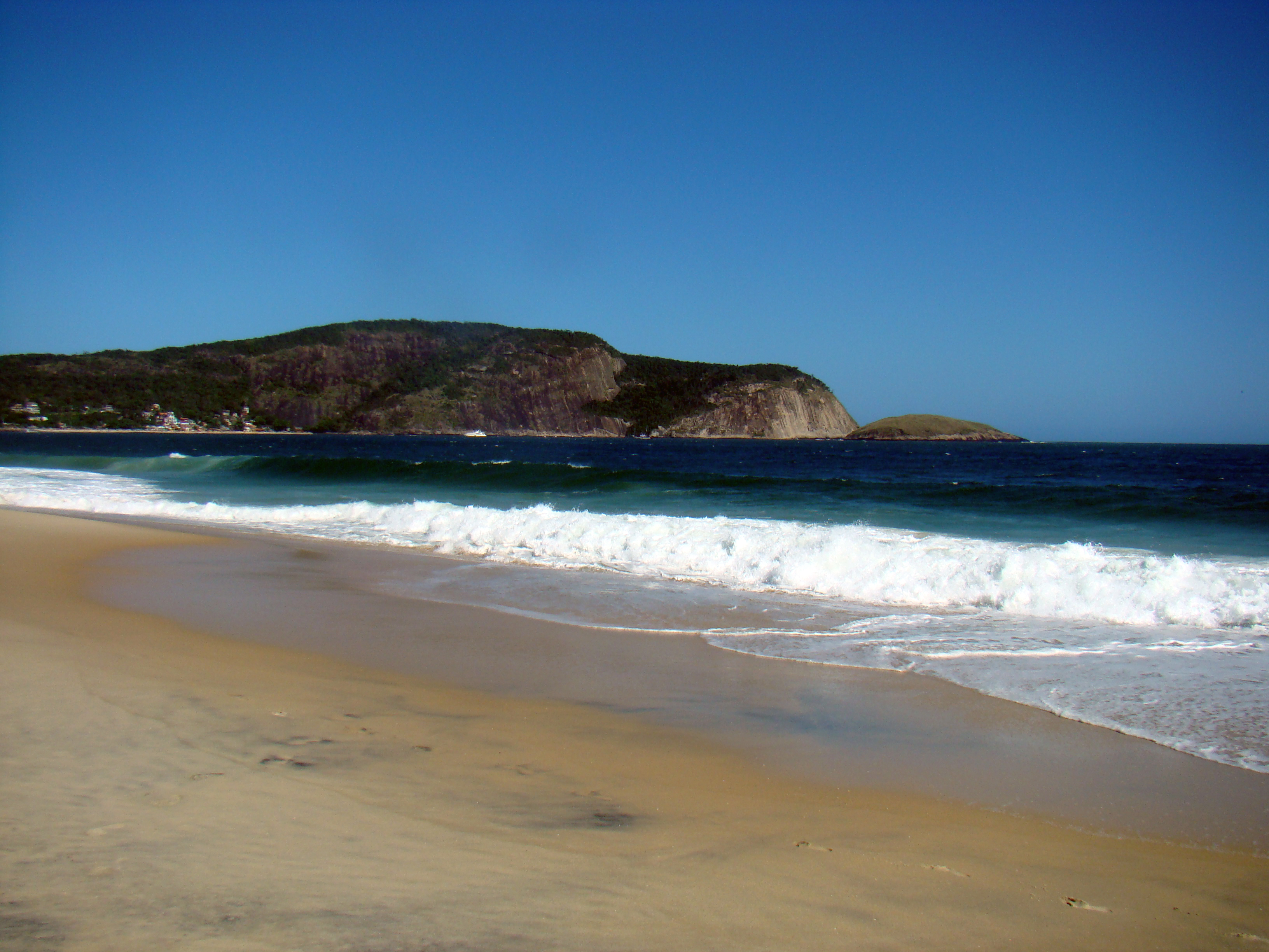 É uma extensão da própria Praia de Itaipu. Suas águas são transparentes e esverdeadas, com areia clara e fina.. A orla é repleta de quiosques especializados em frutos do mar e petiscos, servidos em mesas à beira mar. É a mais frequentada nos finais de semana.